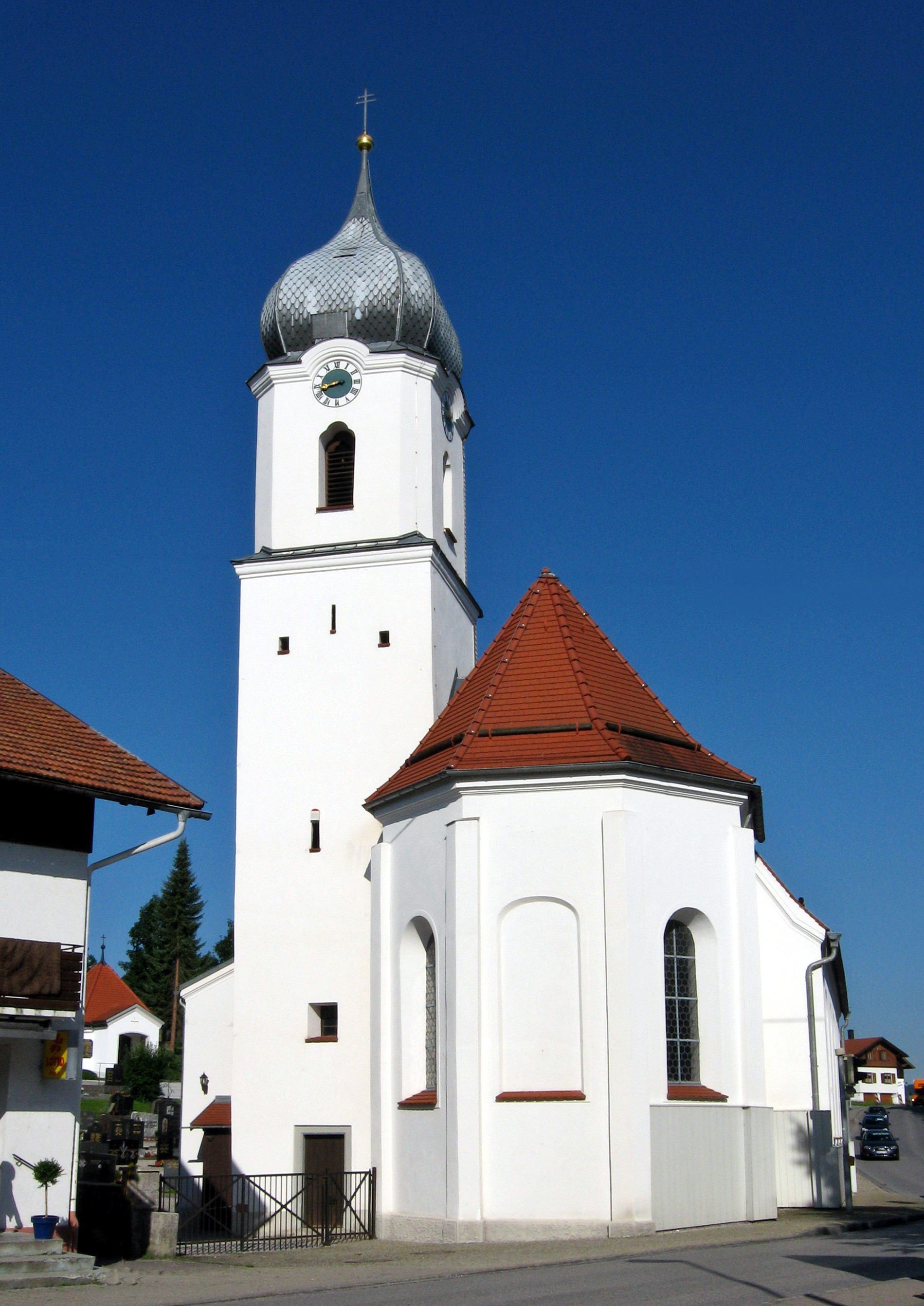 Kirche in Hopferau